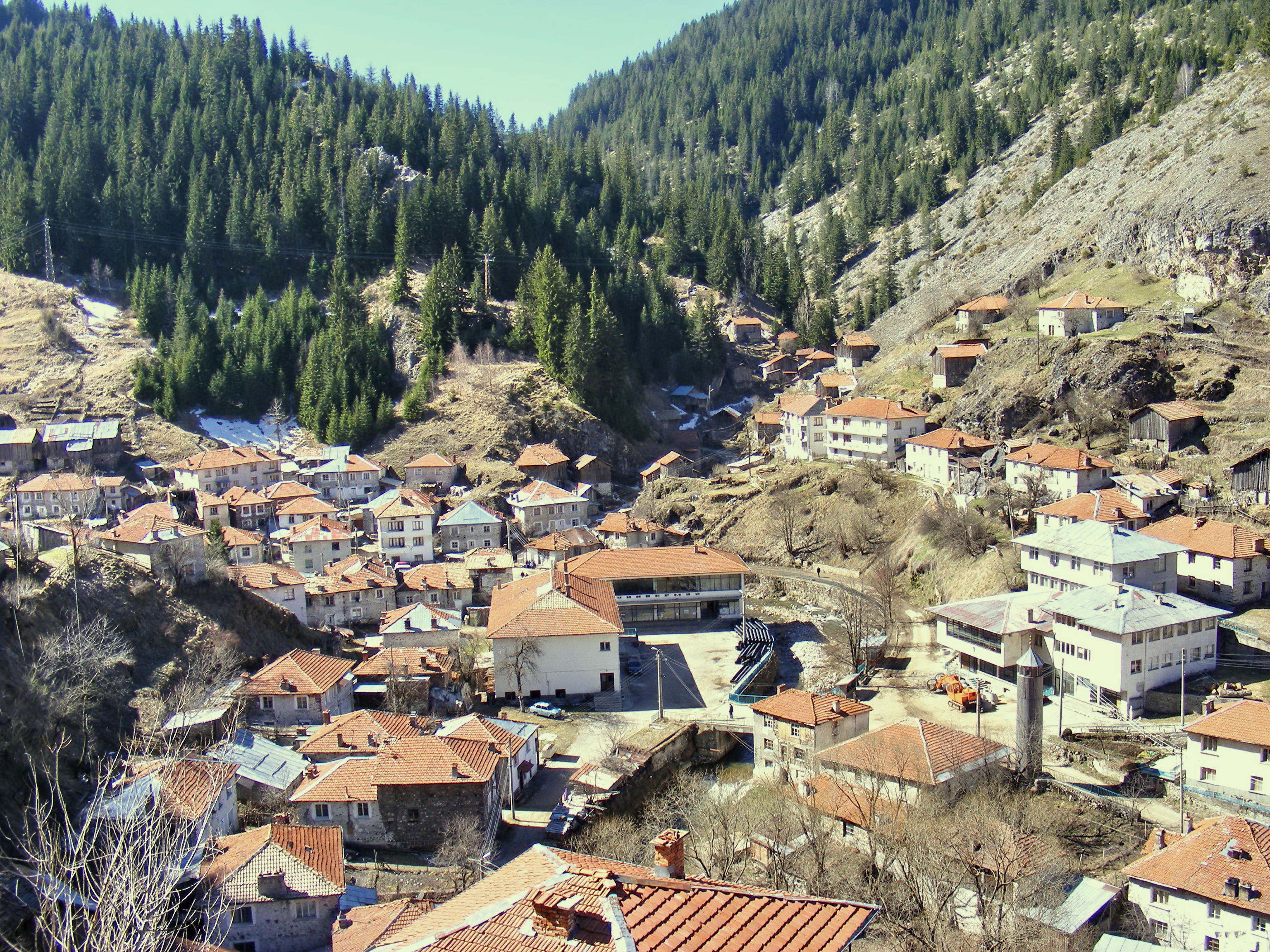 Мугла-площада